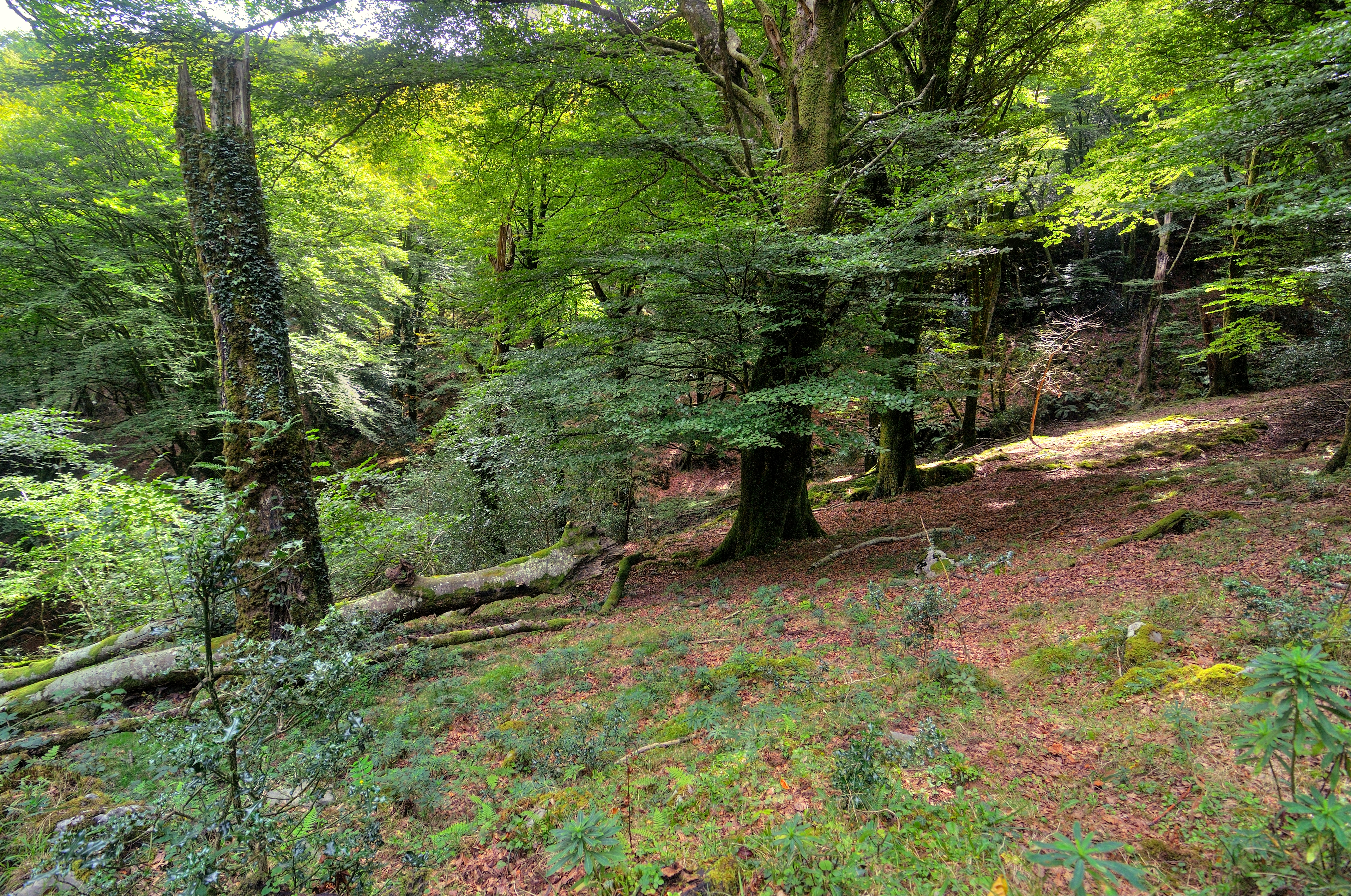 Hayedo de la Biescona, Asturias